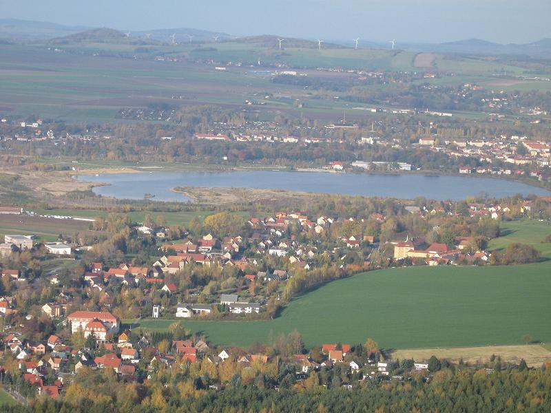 Olbersdorf vom Berg Töpfer aus gesehen im Zittauer Gebirge